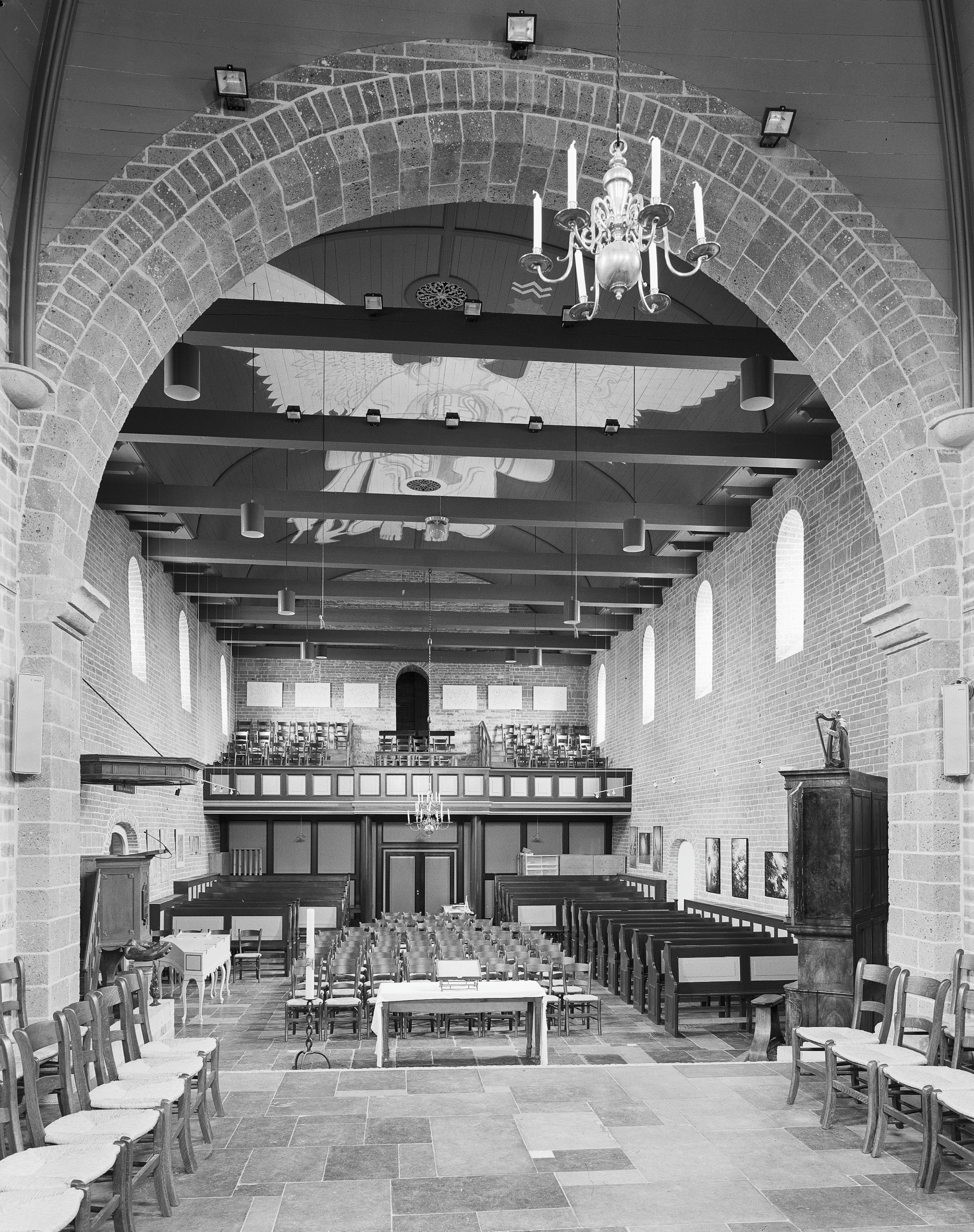 Nederlands Hervormde Kerk: INTERIEUR, OVERZICHT NAAR HET WESTEN